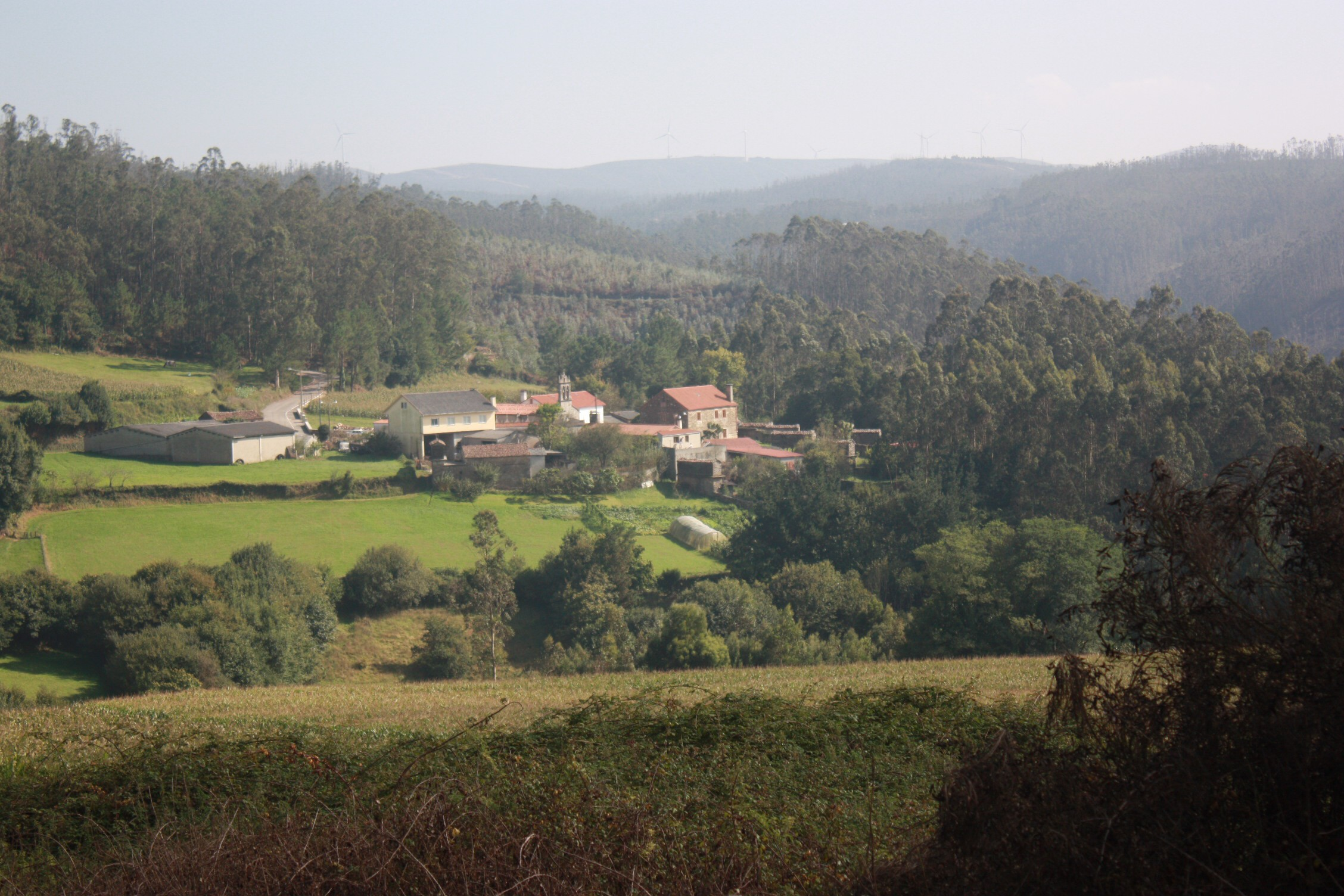 Lugar de Riobo, Riobó, Riobó, Cabana de Bergantiños (Cabana de Bergantiños).